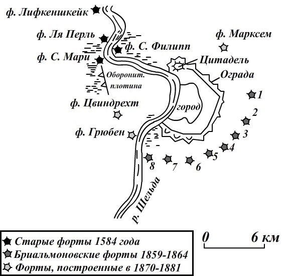 Крепость Антверпен с фортами к 1881 году.